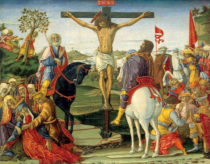 Crucifixion-_1491_Вашингтон_НГИ1.jpg